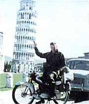 Raufoss-Moped i Pisa